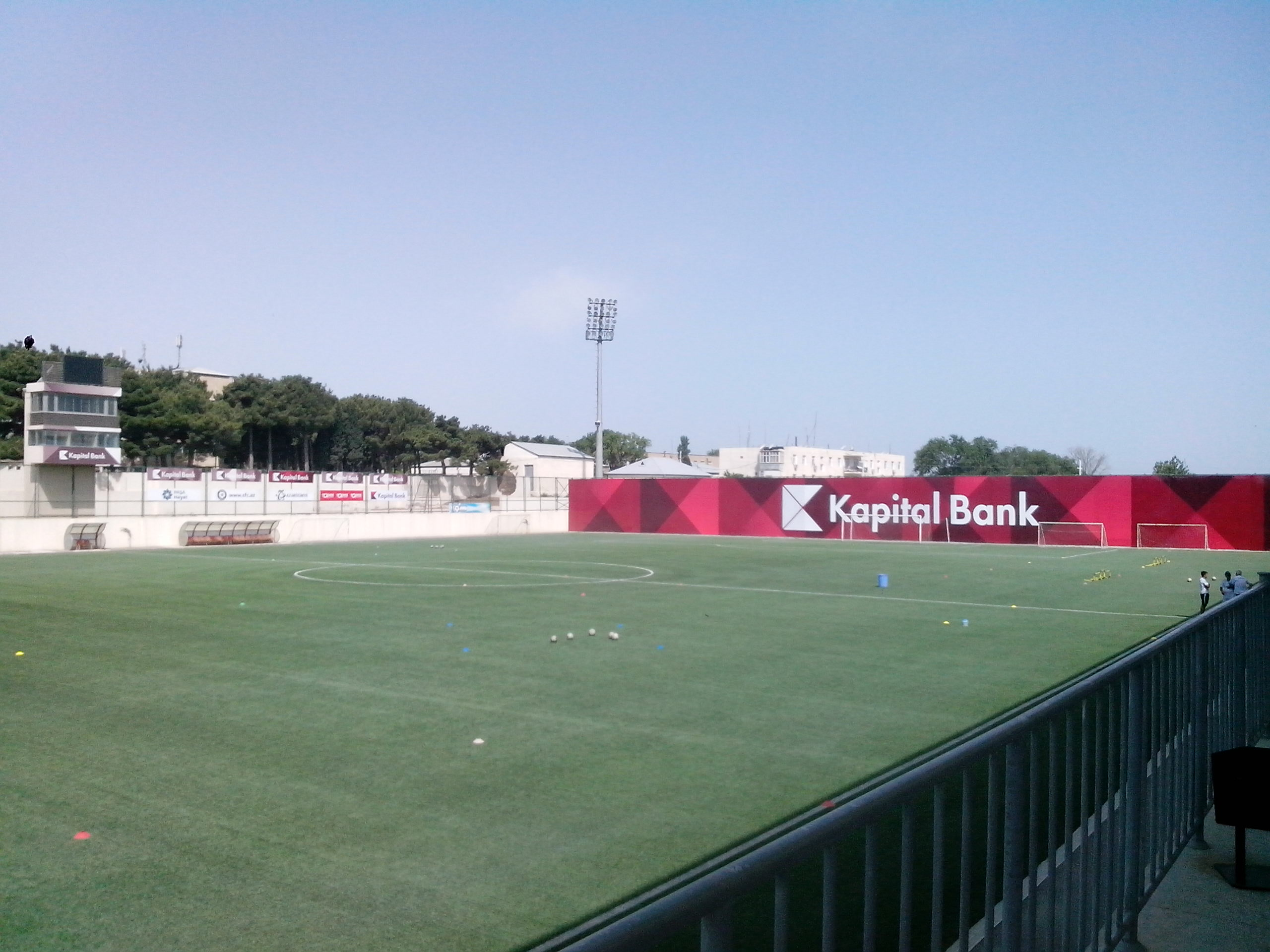 Kapital Bank Arena